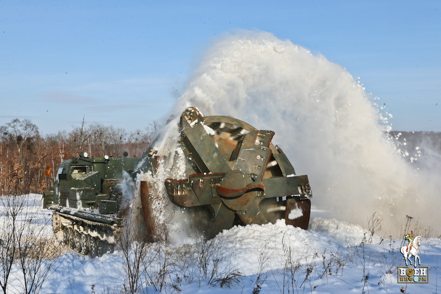 Начало зимнего учебного периода в 14-й отдельной гвардейской инженерной бригаде Восточного военного округа (Хабаровский край).